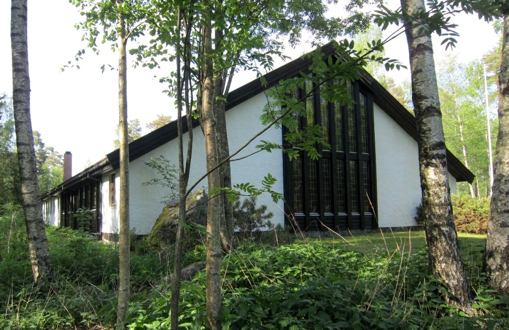 Ås arbeidskirke, Ås kommune, Akershus